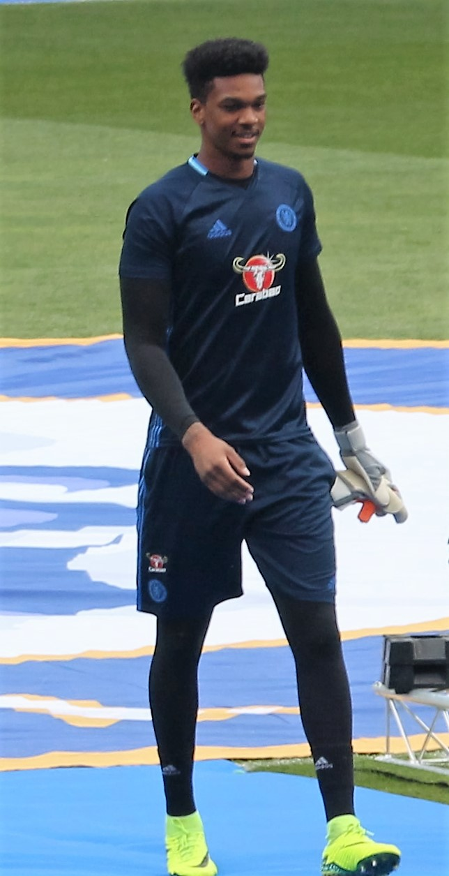 Jamal Blackman CFC